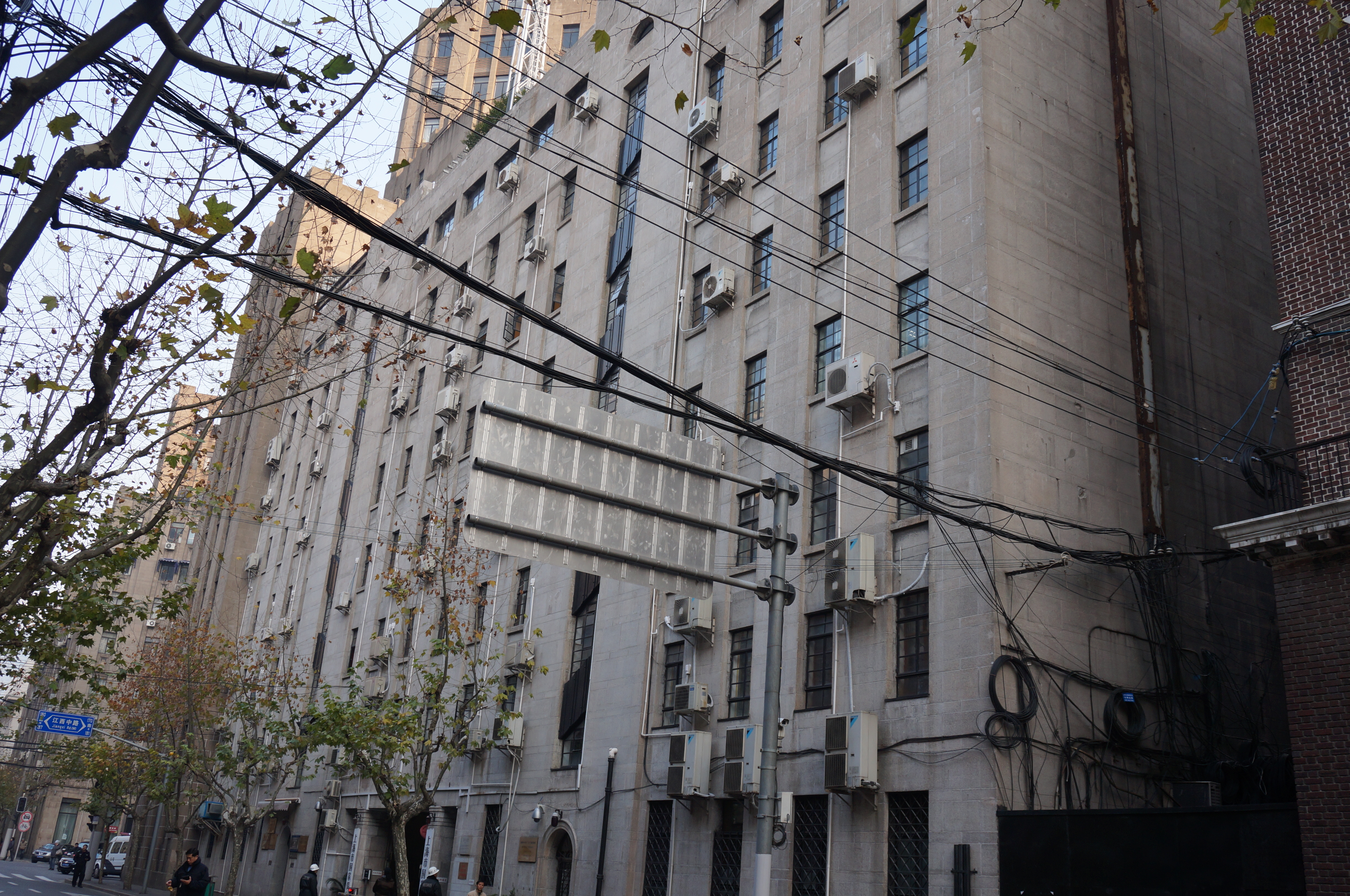 中文（中国大陆）: 原上海中央巡捕房